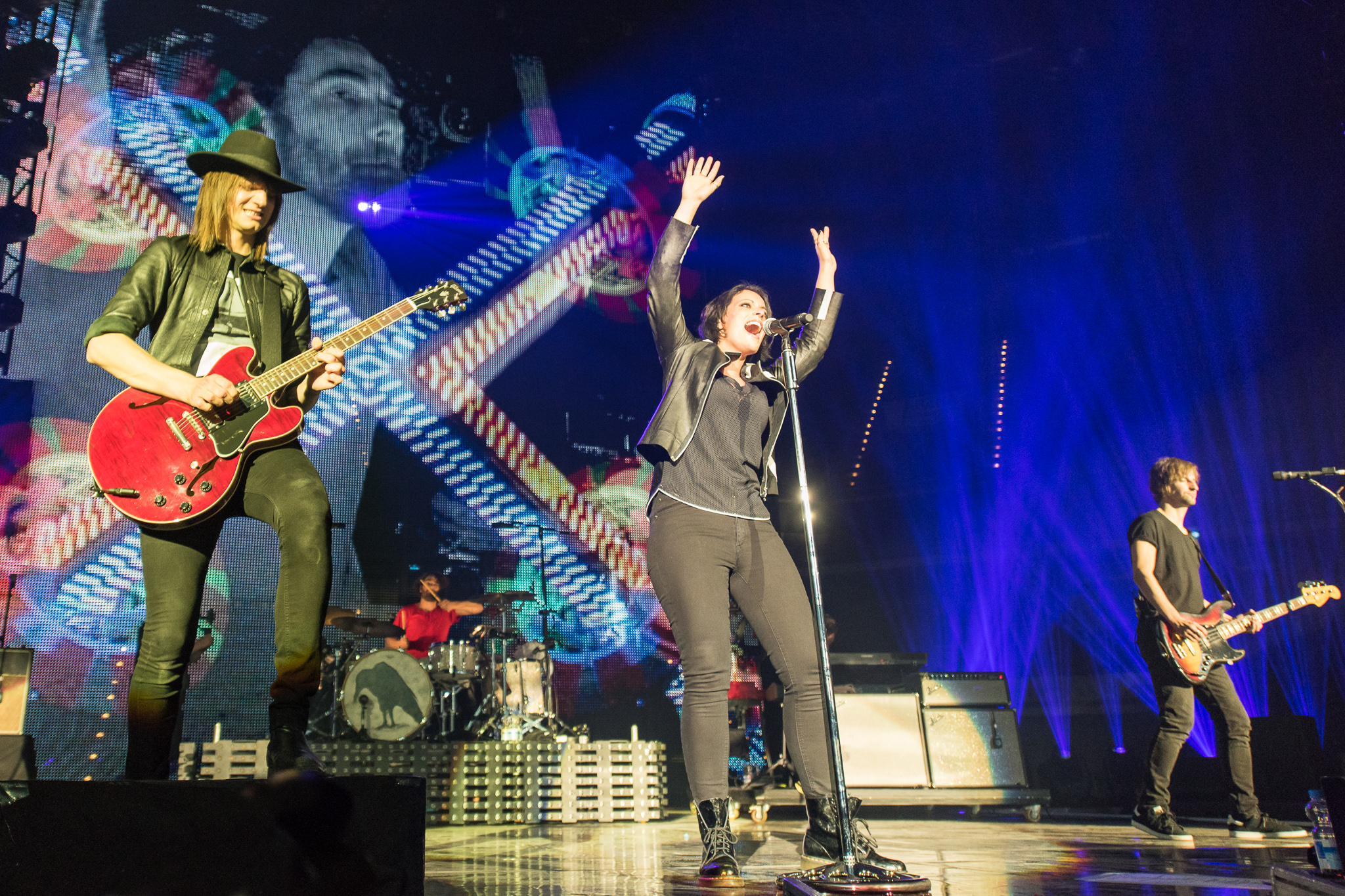 Andreas Nowak,Arena Nürnberger Versicherungen,Concertbüro Franken,Johannes Stolle,Konzert,Livekonzert,Livemusik,Musik,Silbermond,Stefanie Kloß,Thomas Stolle,Leichtes Gepäck Tour 2016